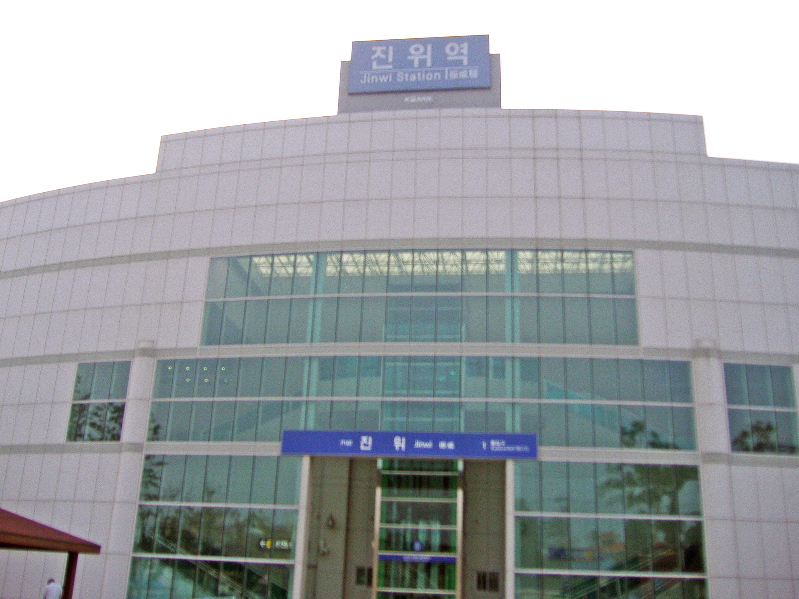 振威駅 駅舎